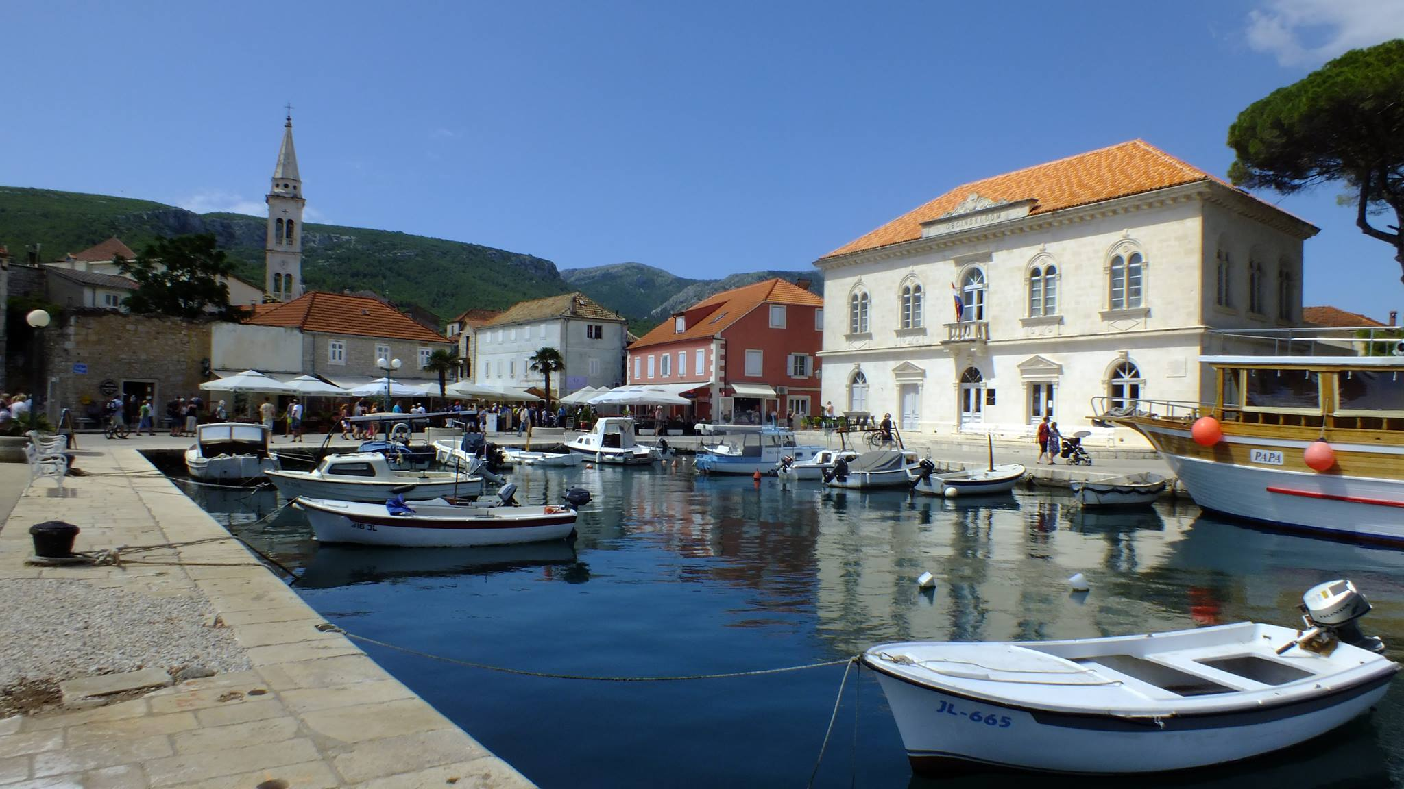 Město Jelsa na ostrově Hvar